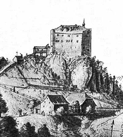 Burg Gilgenberg im Kanton Solothurn, Ansicht von Süden